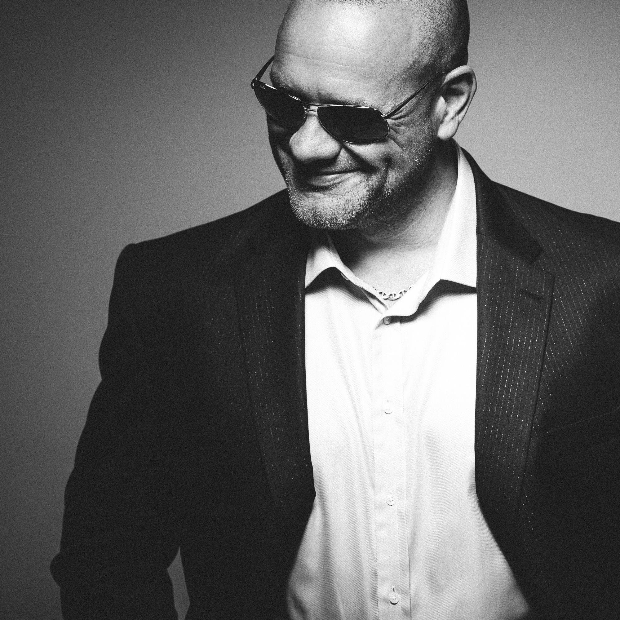 Ronny Rockstroh - Pressefoto 2015. deutscher House-DJ und Musikproduzent